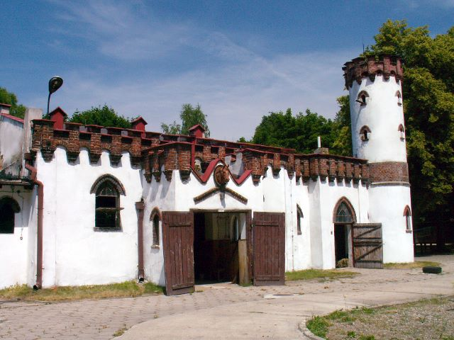 Łódzki Klub Jeździecki